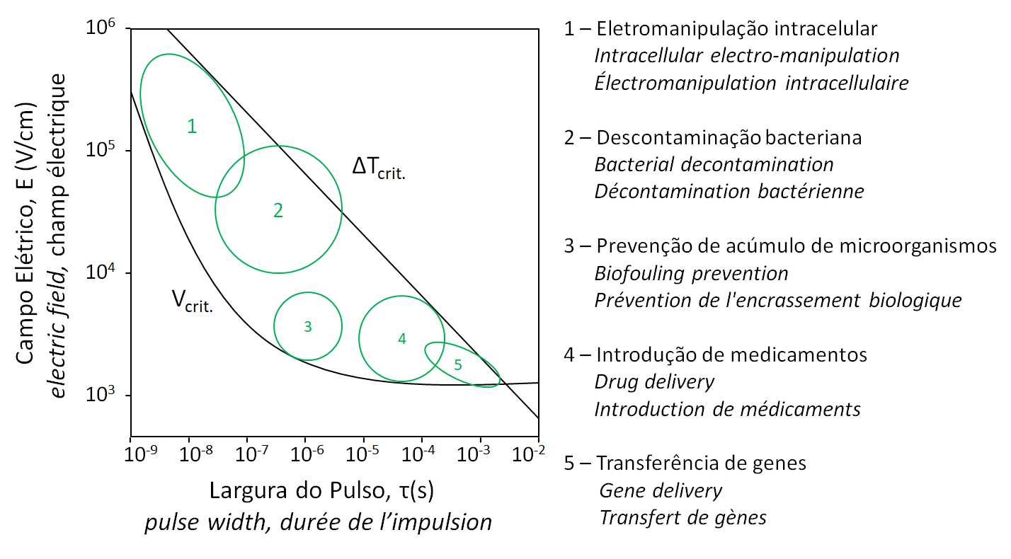 Relações ótimas entre a intensidade de campo elétrico e largura de pulso para diferentes aplicações. (Adaptado de [1] e [2]). [1] Dias da Silva, M. Desenvolvimento e Avaliação de um Gerador Programável de Pulsos Monofásicos de Campo Elétrico. 2011. Dissertação. Universidade Federal do Rio de Janeiro. [2] Schoenbach et al. Bioelectrics-new applications for pulsed power technology. 2002. IEEE Transactions on Plasma Science.